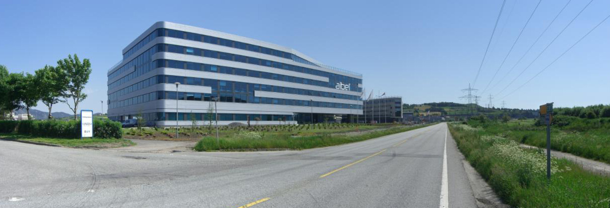 Forusbeen in Sandnes, Norway